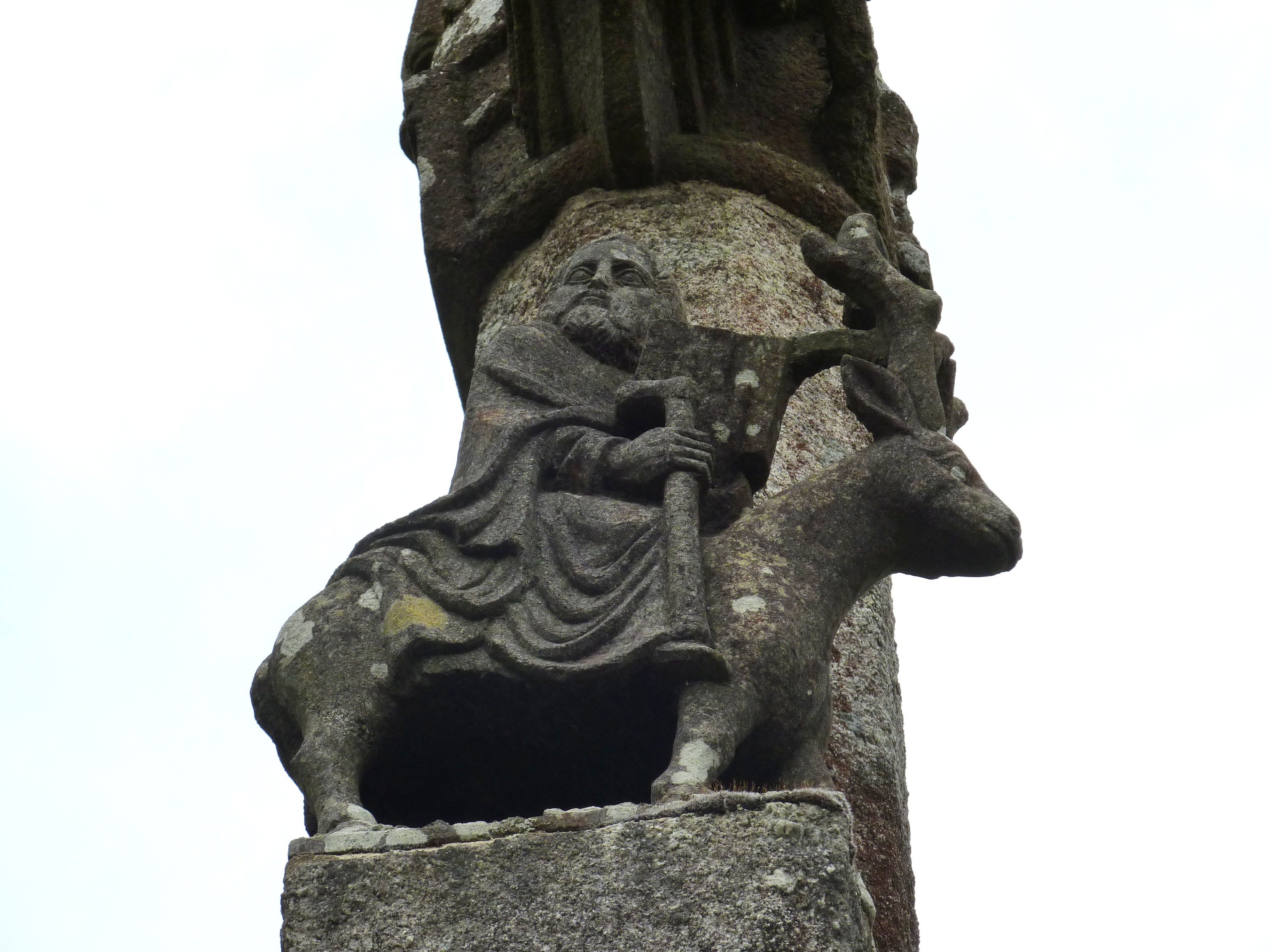 Loqueffret: saint Edern sur son cerf (détail d'un calvaire route de Lannédern)